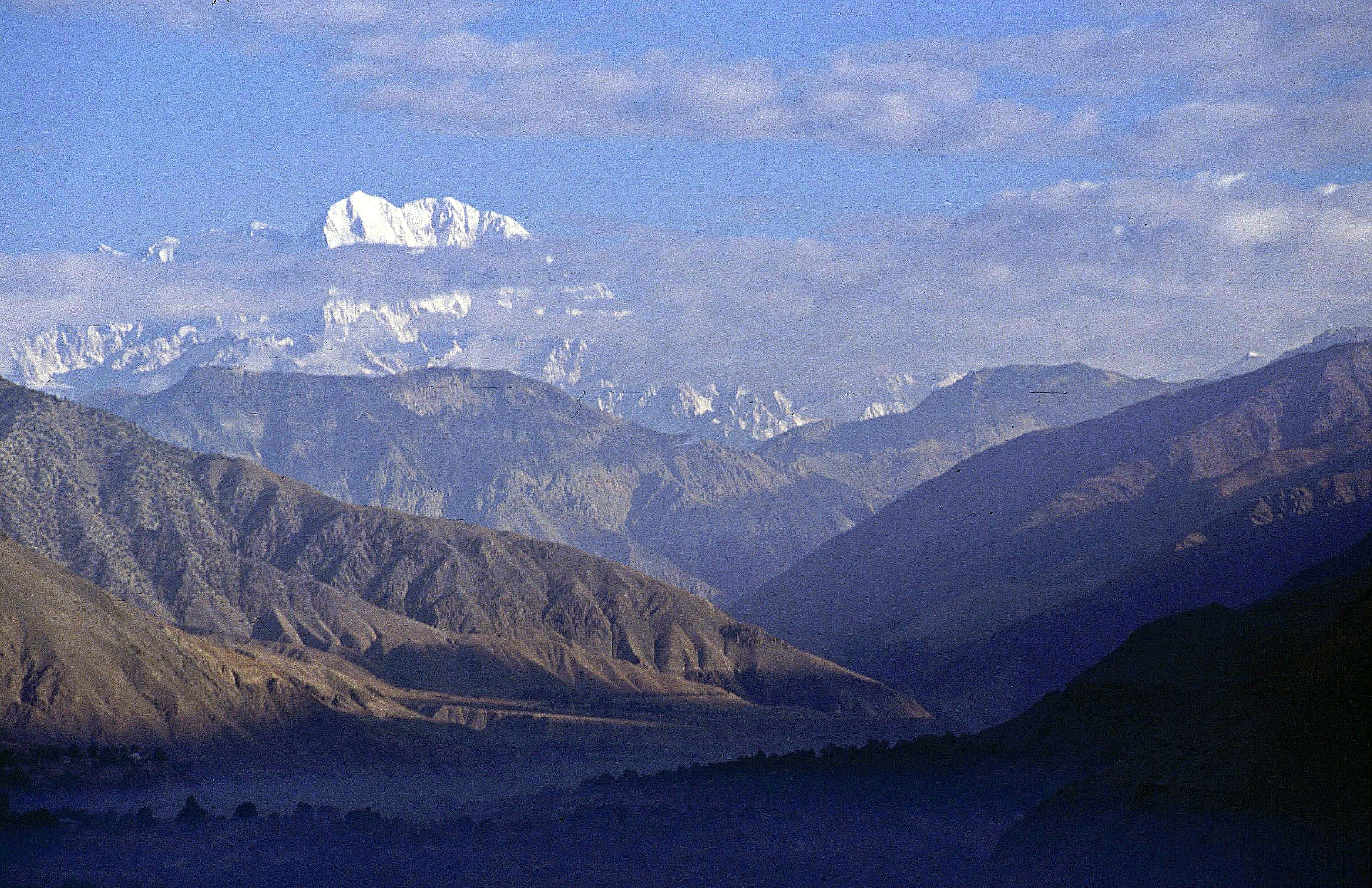 Tirich Mir (7700m) im Hindukusch